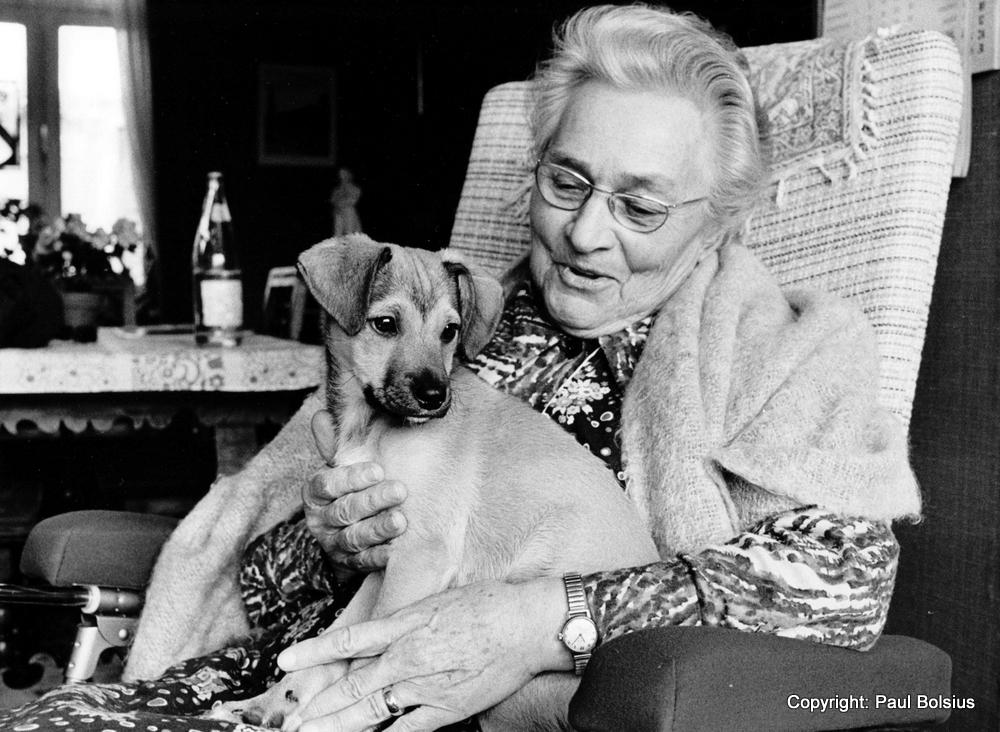 Vlaams schrijfster